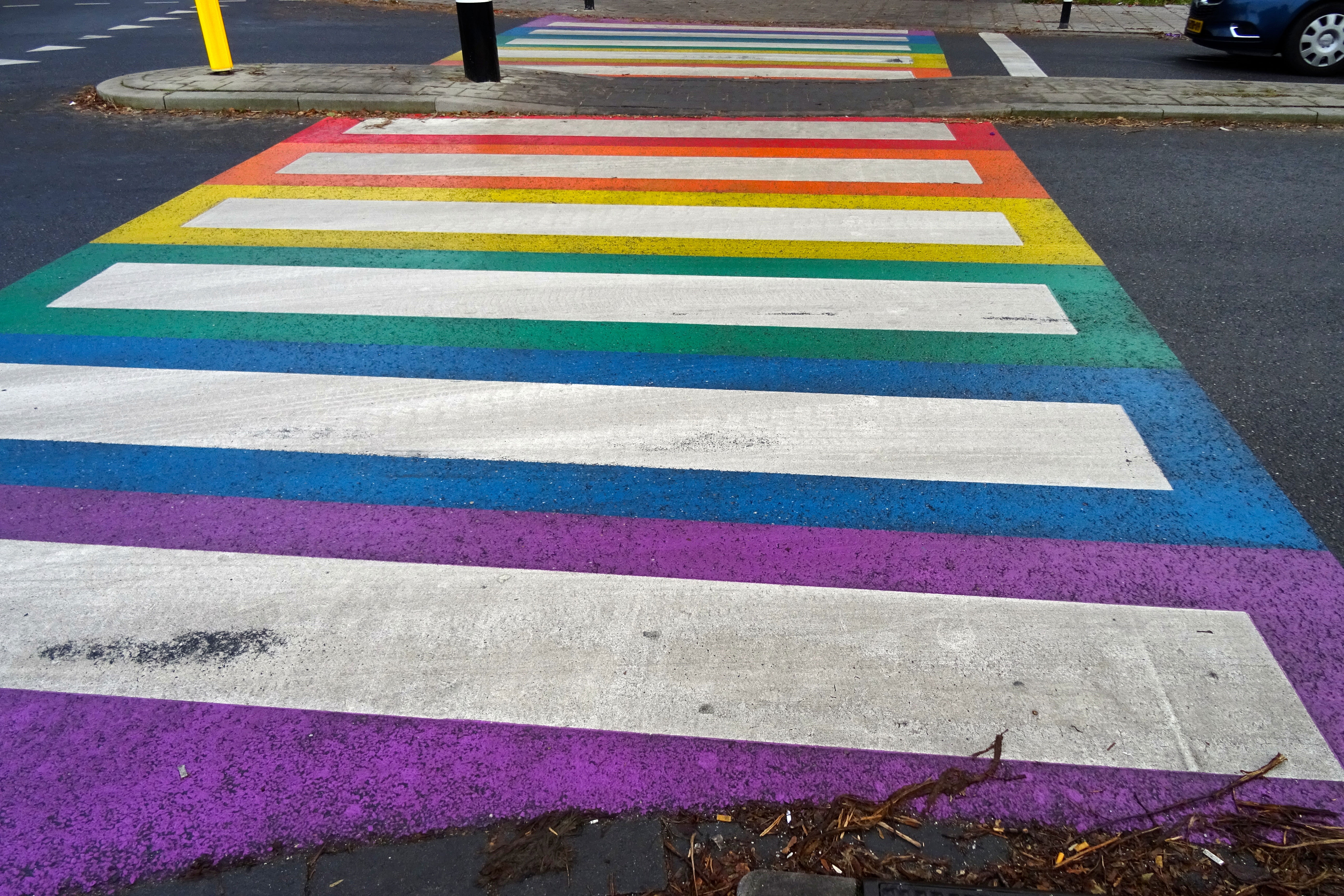 Regenboogpad in Gouda van de Fluwelensingel naar de Tiendewegbrug in Gouda)